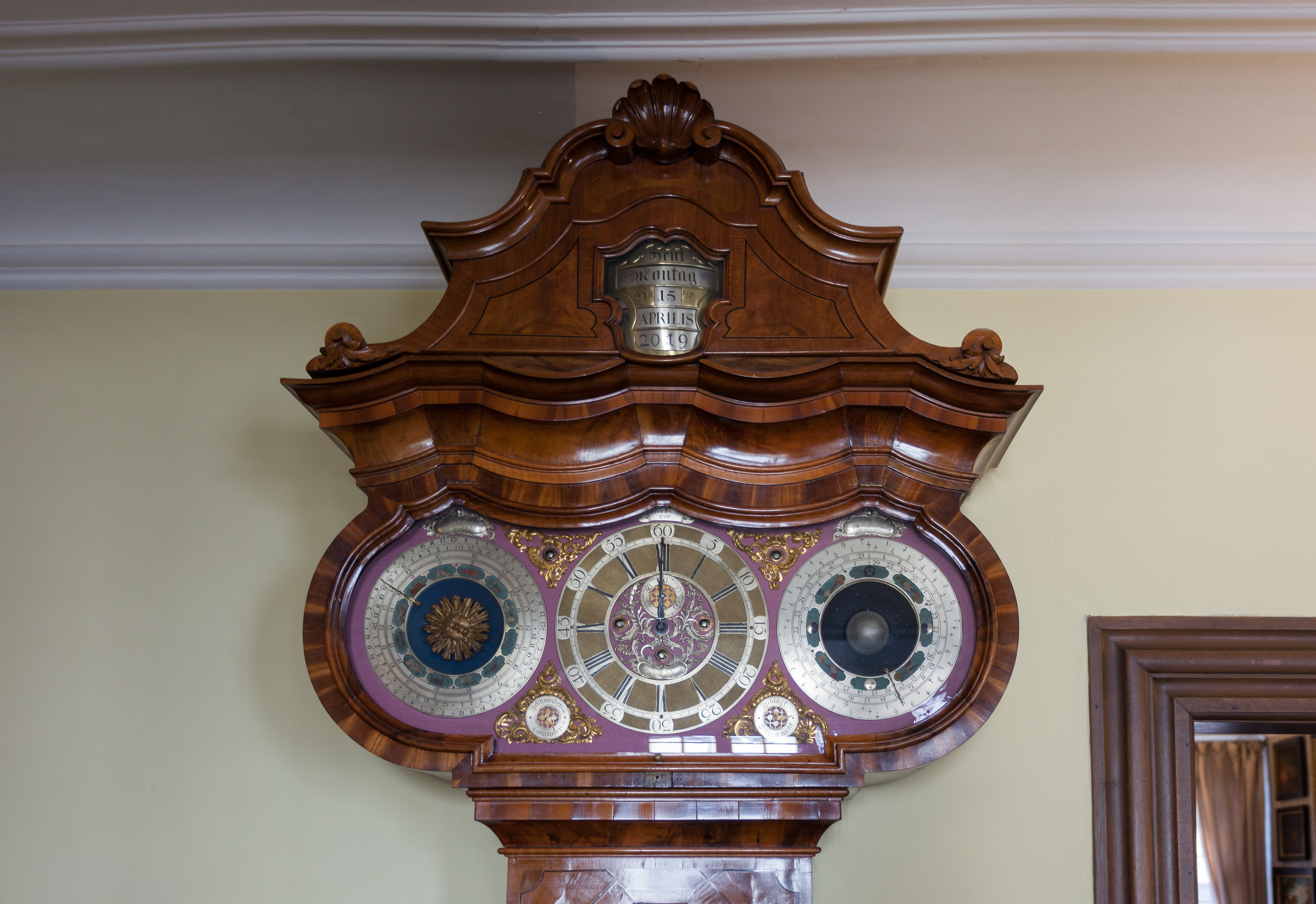 Huesgen–Uhr, Goethe–Haus im Detail